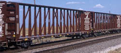 Center beam flat cars